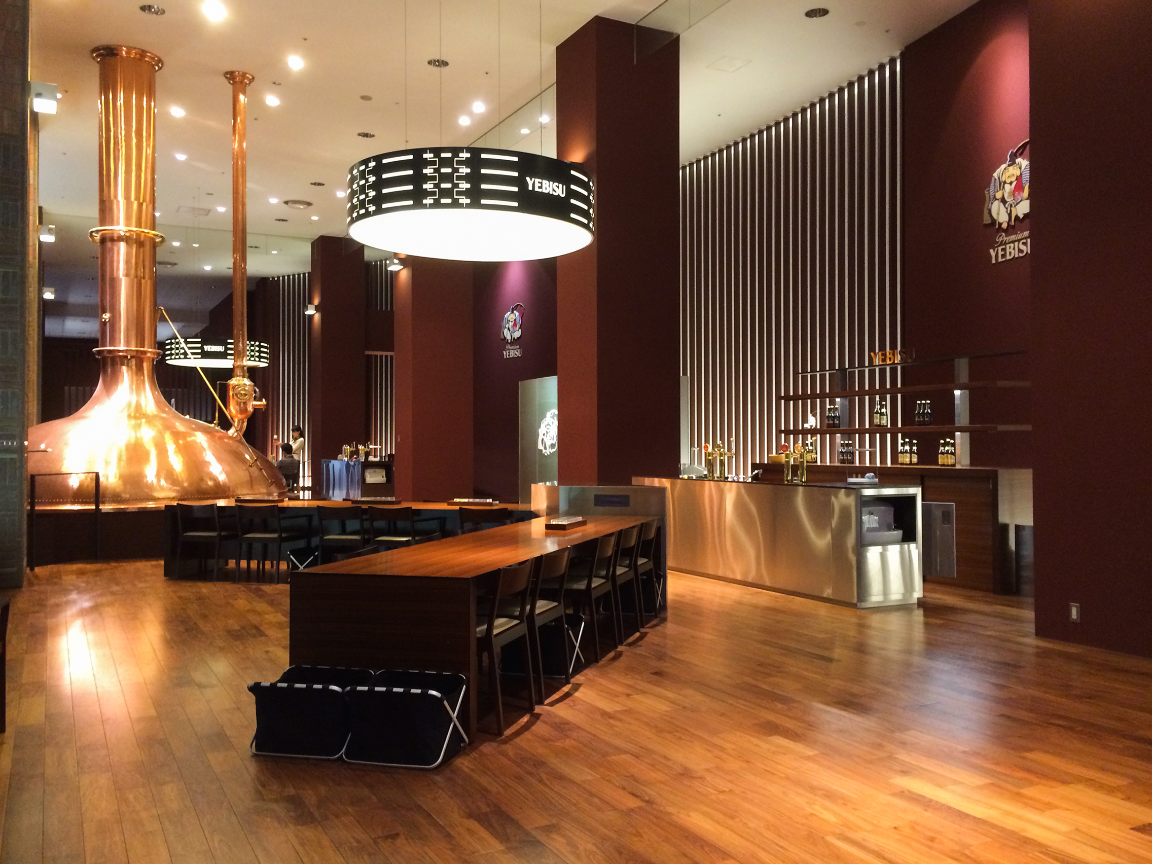 Museum of Yebisu Beer Model